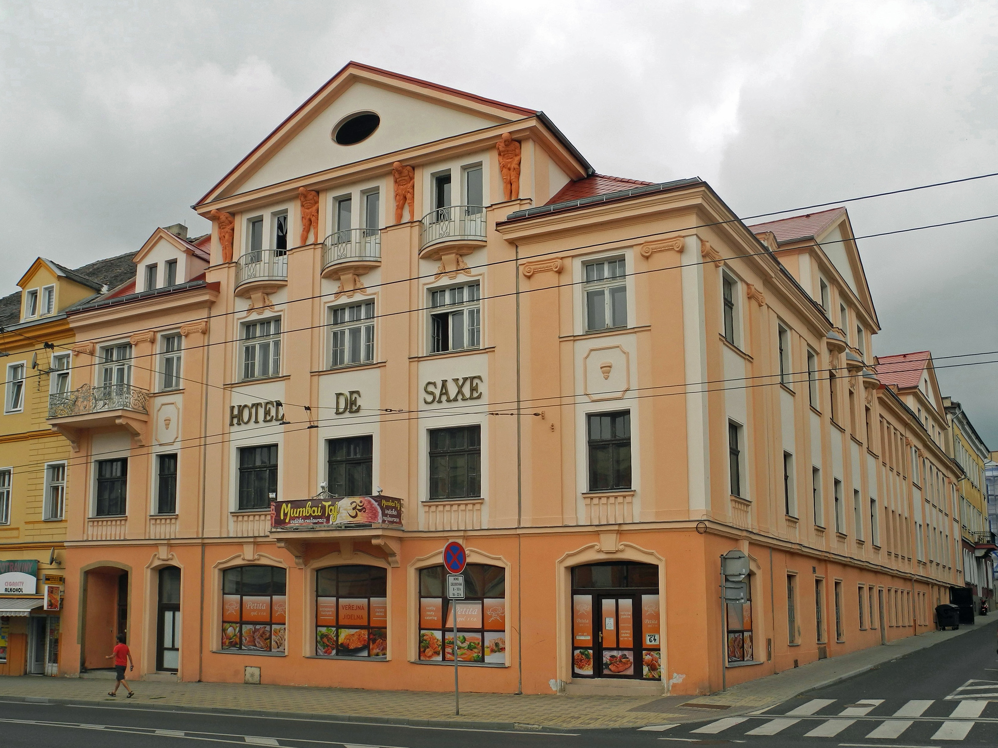 Hotel de Saxe in Teplitz - Teplice, Masarykova třída 661/35, benannt nach Joseph Xavier Raphael Philipp Benno de Saxe (1767–1802), Chevalier de Saxe. Umbau in den 1920er bis 1930er Jahren nach einem Entwurf des Architekten Rudolf Bitzan, siehe [1].